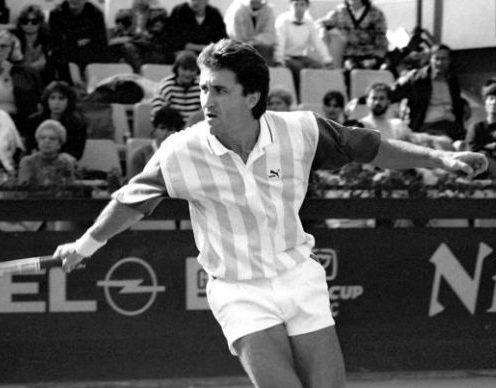 Florin Segărceanu